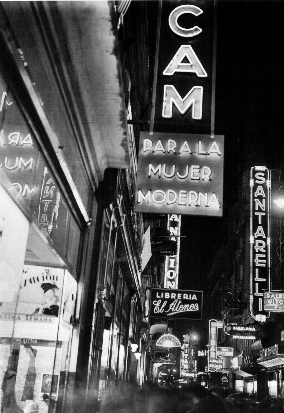 Marquesinas sobre la calle Florida, Buenos Aires, en 1936.